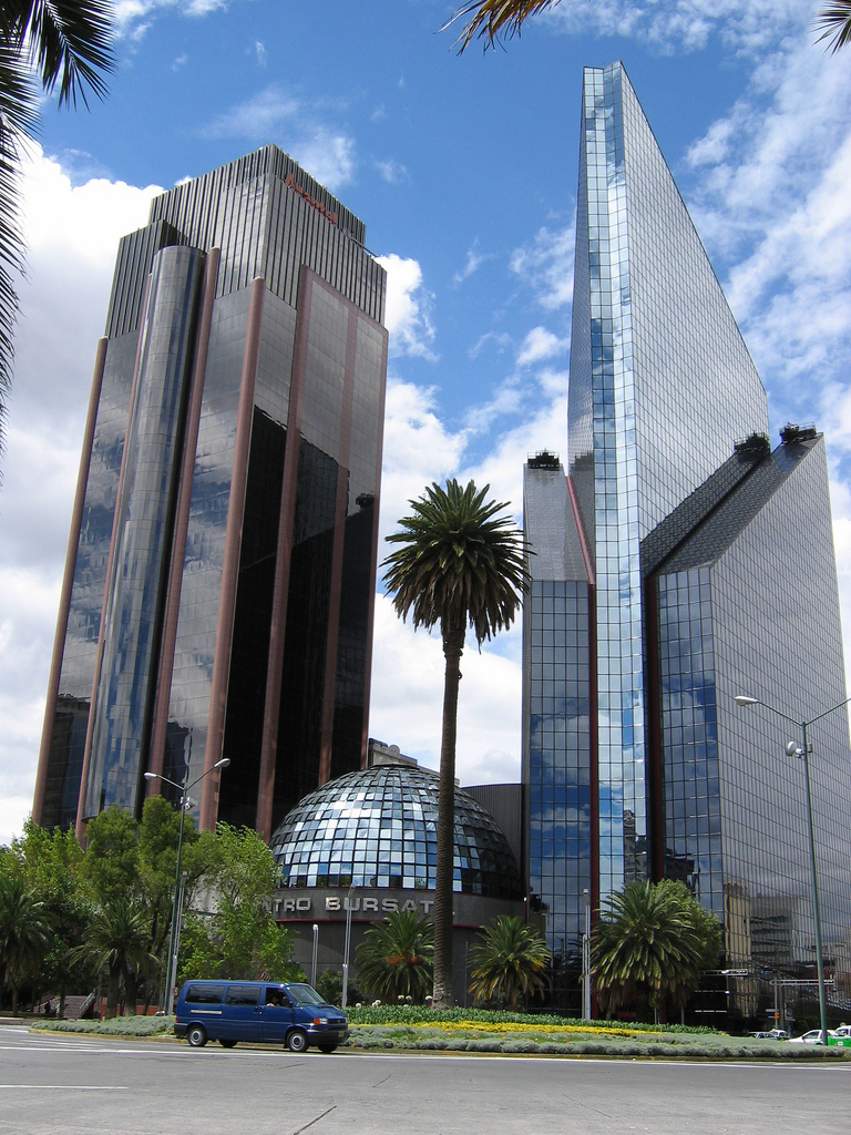 Torre Axtel y Bolsa de Valores